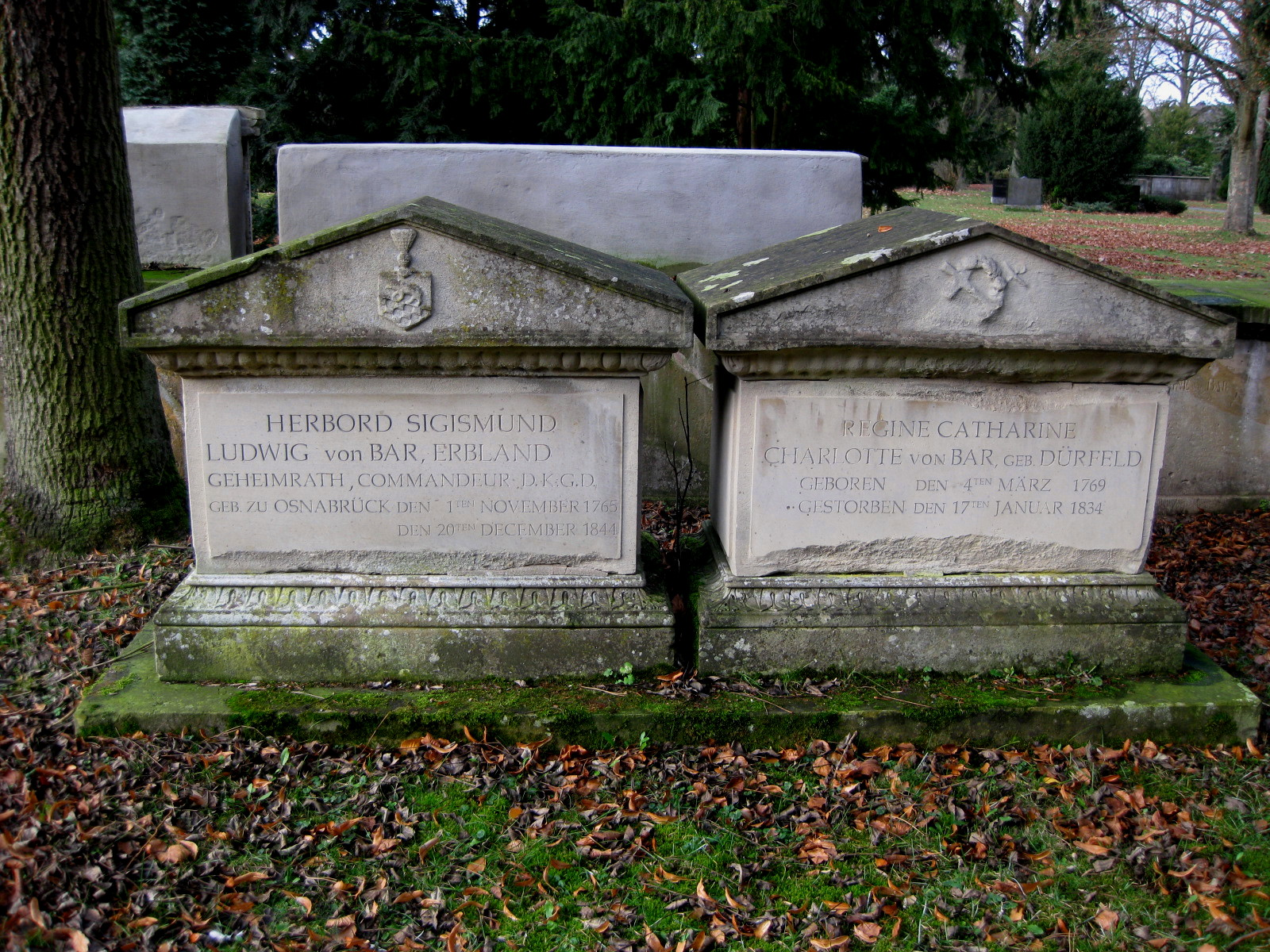 Sarkophag des Landdrosts Herbort Sigismund Ludwig von Bar (1765-1844), höchster hannoverscher Verwaltungsbeámter seiner Zeit in Osnabrück, und seiner Frau Regine Catharine Charlotte von Bar, gebürtig Dürfeld (1769-1834), auf dem Johannisfriedhof in Osnabrück